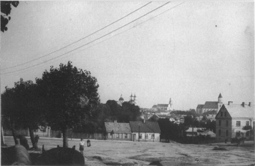 Беларуская (тарашкевіца): Дроўны рынак, Горадня (1930-ыя)